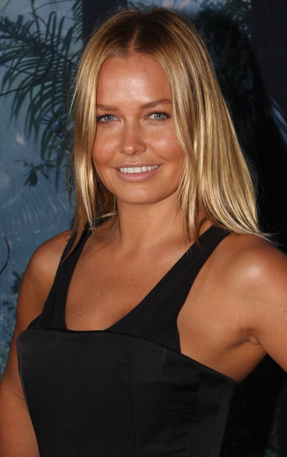 OVO OPENING NIGHT CELEBRITY ‘ORANGE’ CARPET ARRIVALS